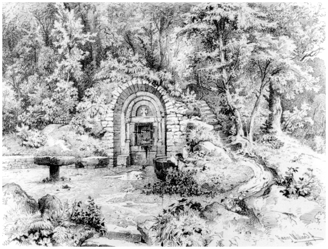 Der Brunnen der heiligen Elisabeth